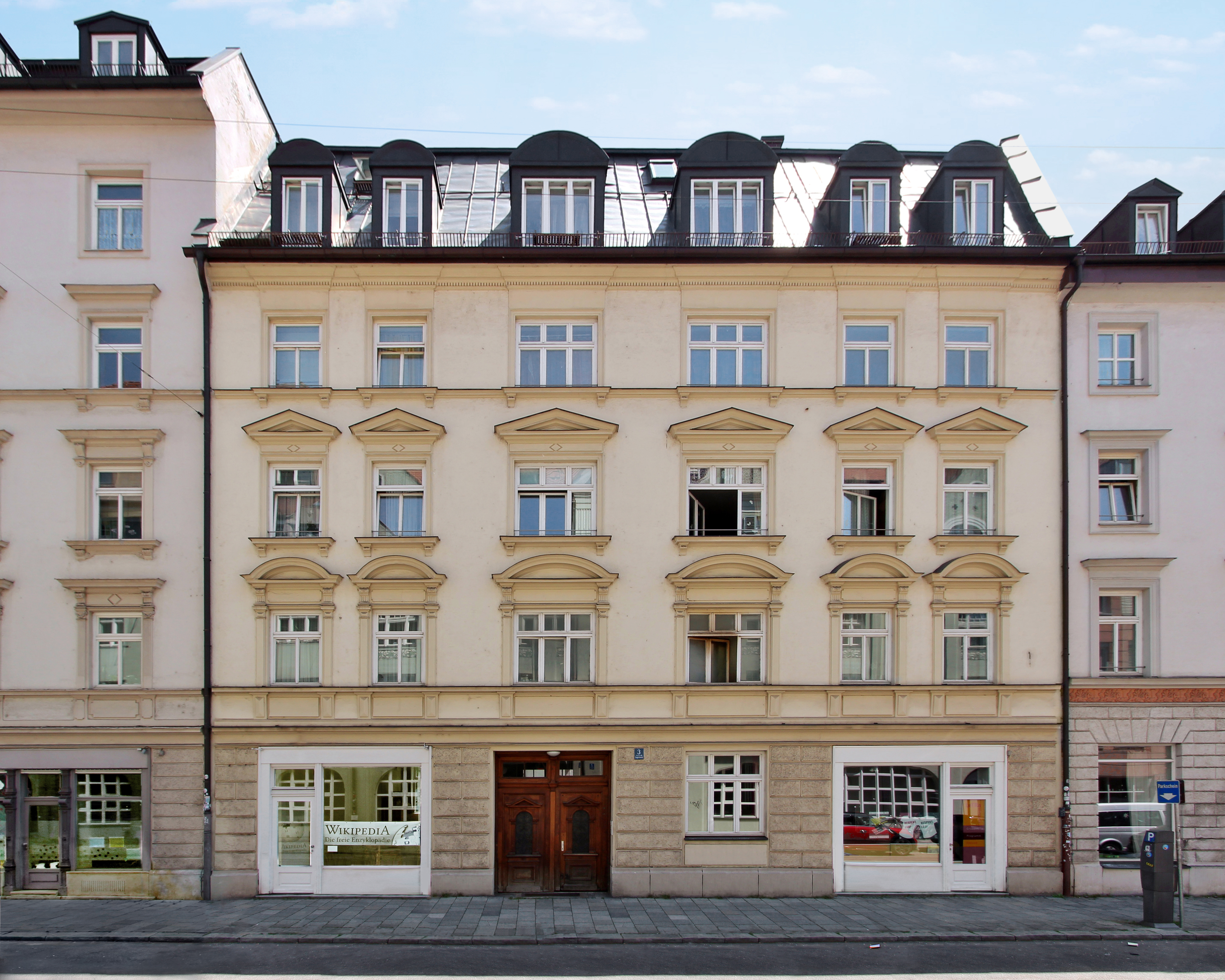 Das denkmalgeschützte Mietshaus Angertorstraße 3.